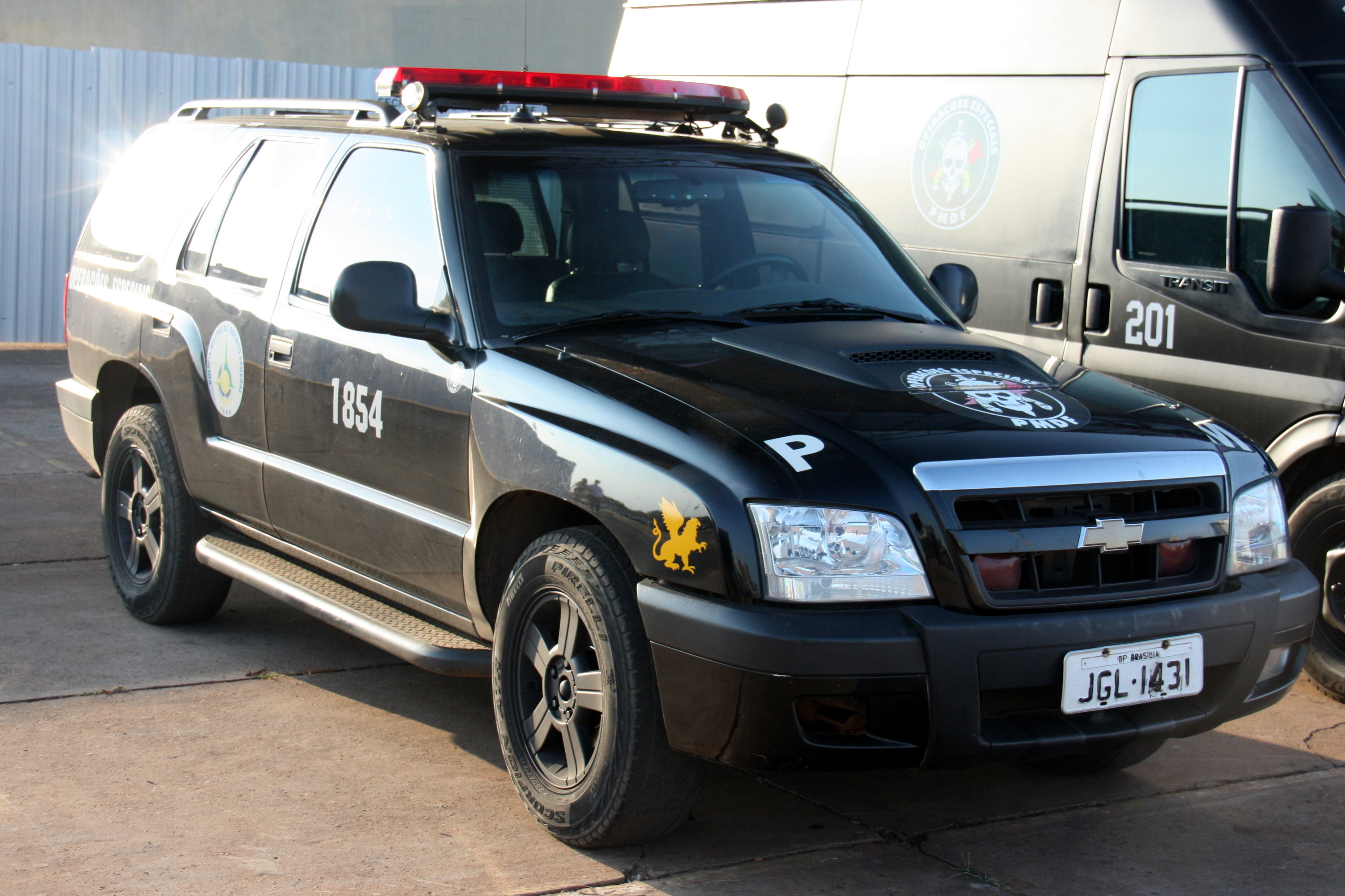 Batalhão de Operações Especiais Polícia Militar do Distrito Federal